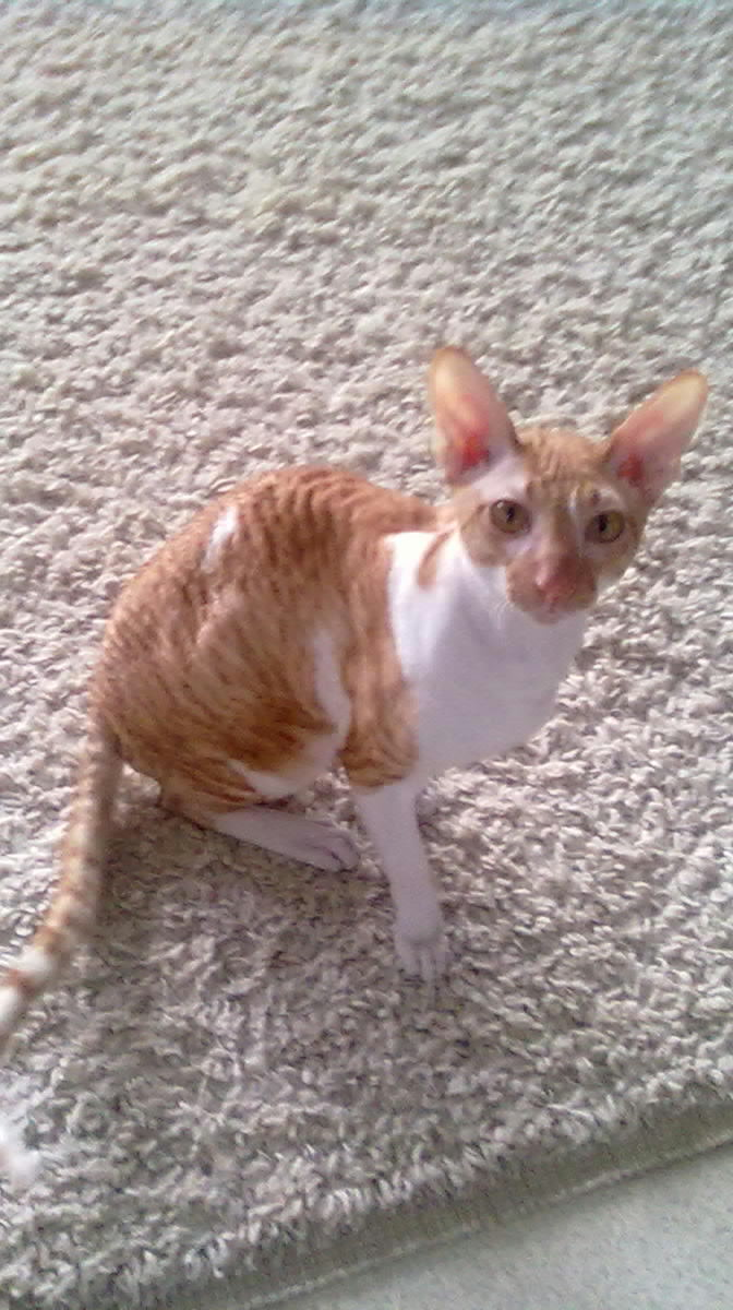 cornish rex